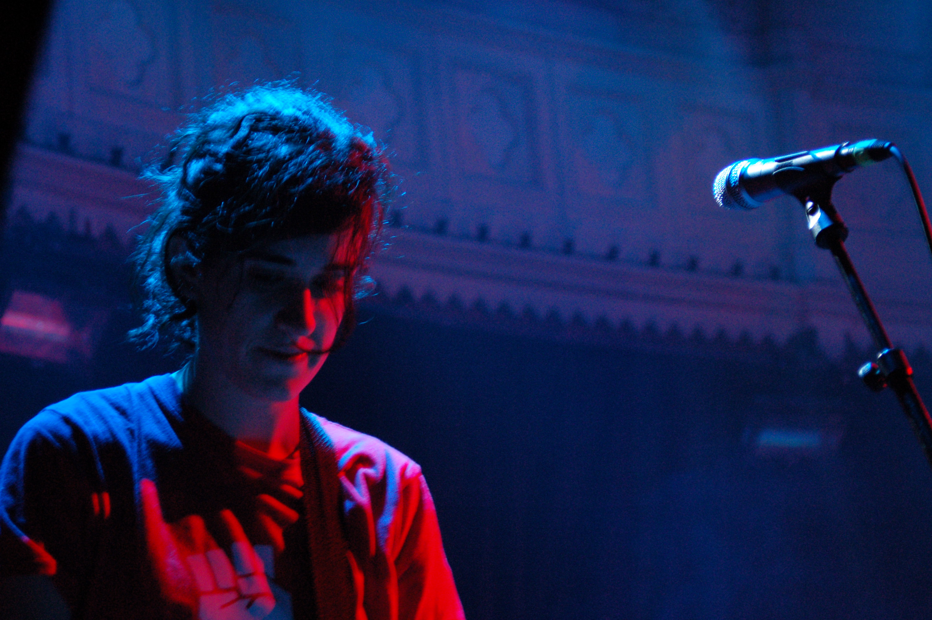 Cansei de Ser Sexy - Paradiso, Amsterdam 20.11.06